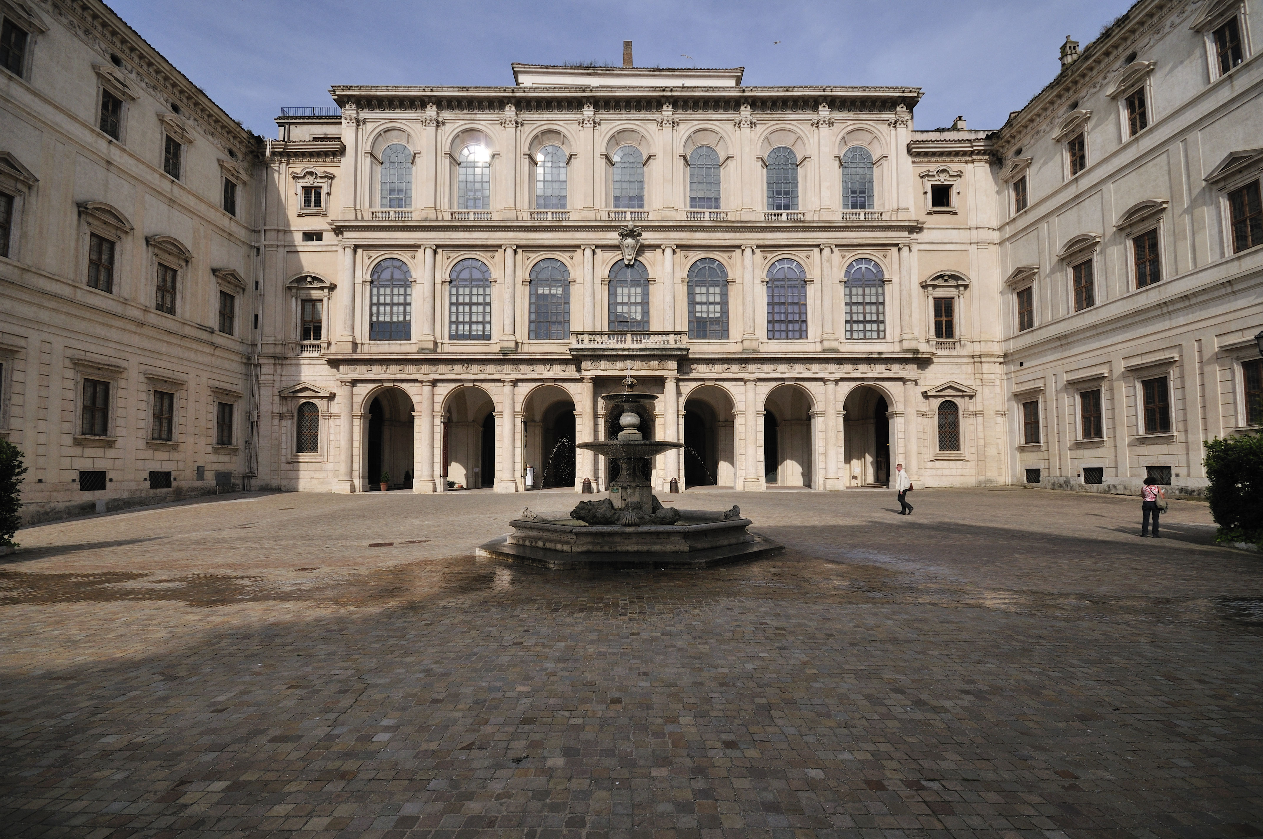 Palazzo Barberini, Roma, Italia